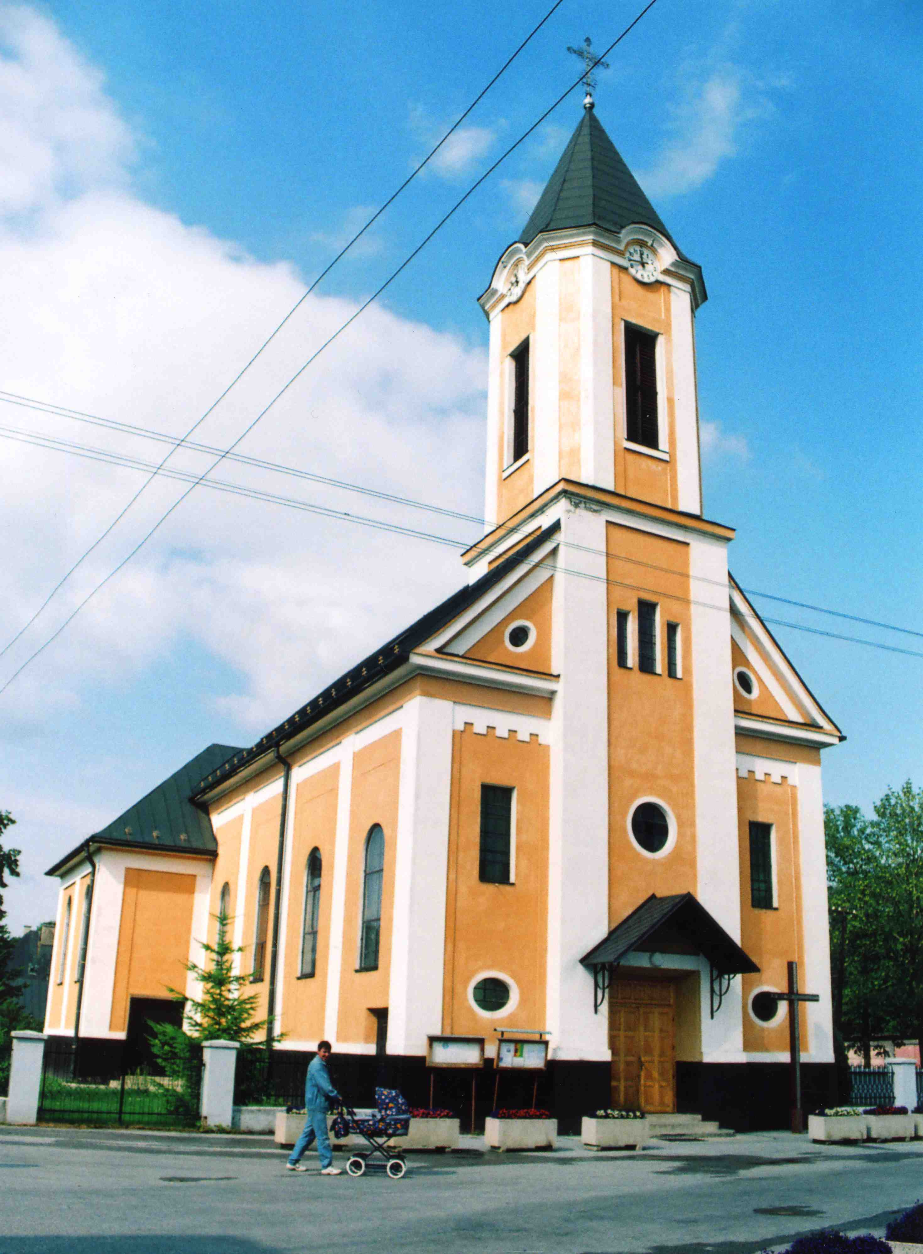 Kostol svätého Michala Lednické Rovne This medium shows the protected monument with the number 308-746/0 in the Slovak Republic.